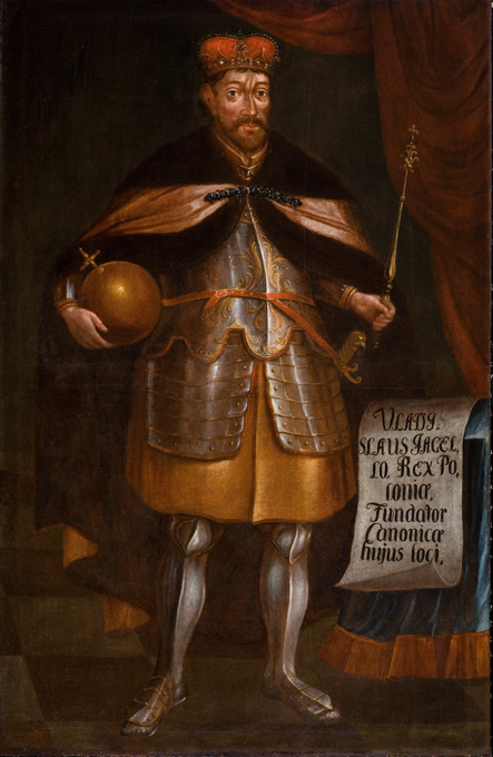 Беларуская (тарашкевіца): Партрэт вялікага князя літоўскага Ягайлы (Jagajła)